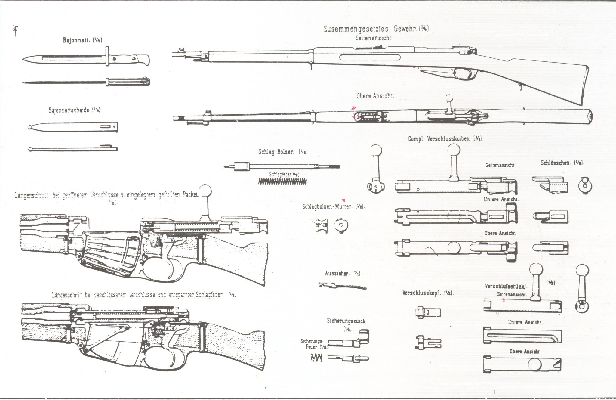 Skica puške Mannlicher M93.